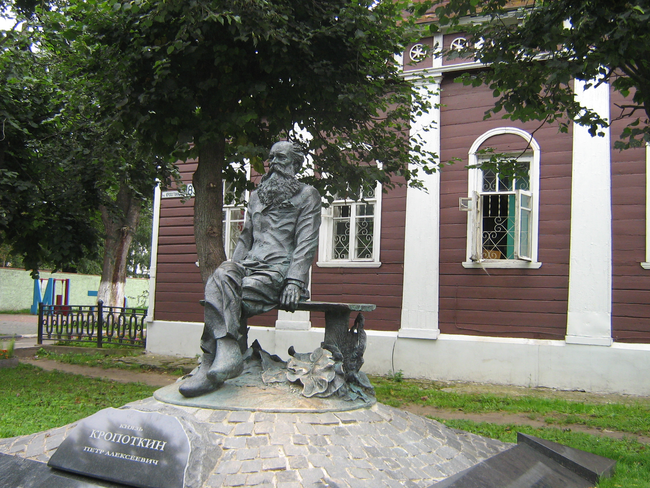 Дом Новоселова (Москва и Московская область, Дмитров, Кропоткинская улица, 83)